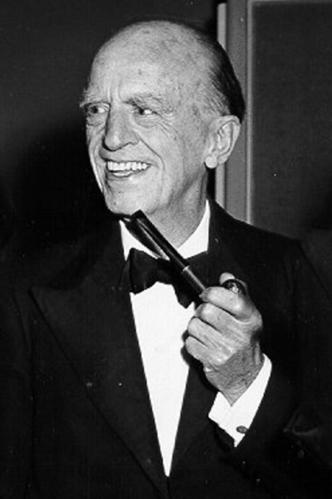 Hendrik Brand